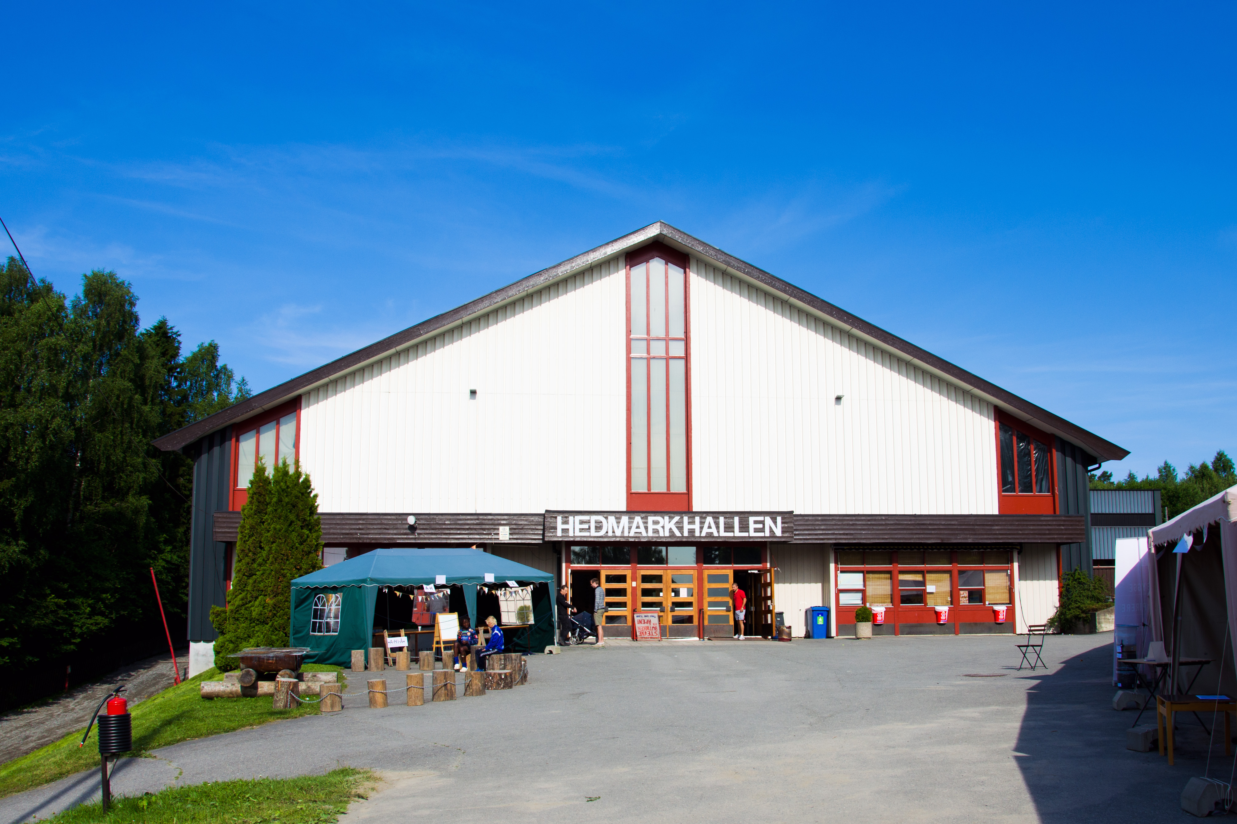 Hedmarkhallen, på Hedmarktoppen i Hamar, Hedmark, Norge